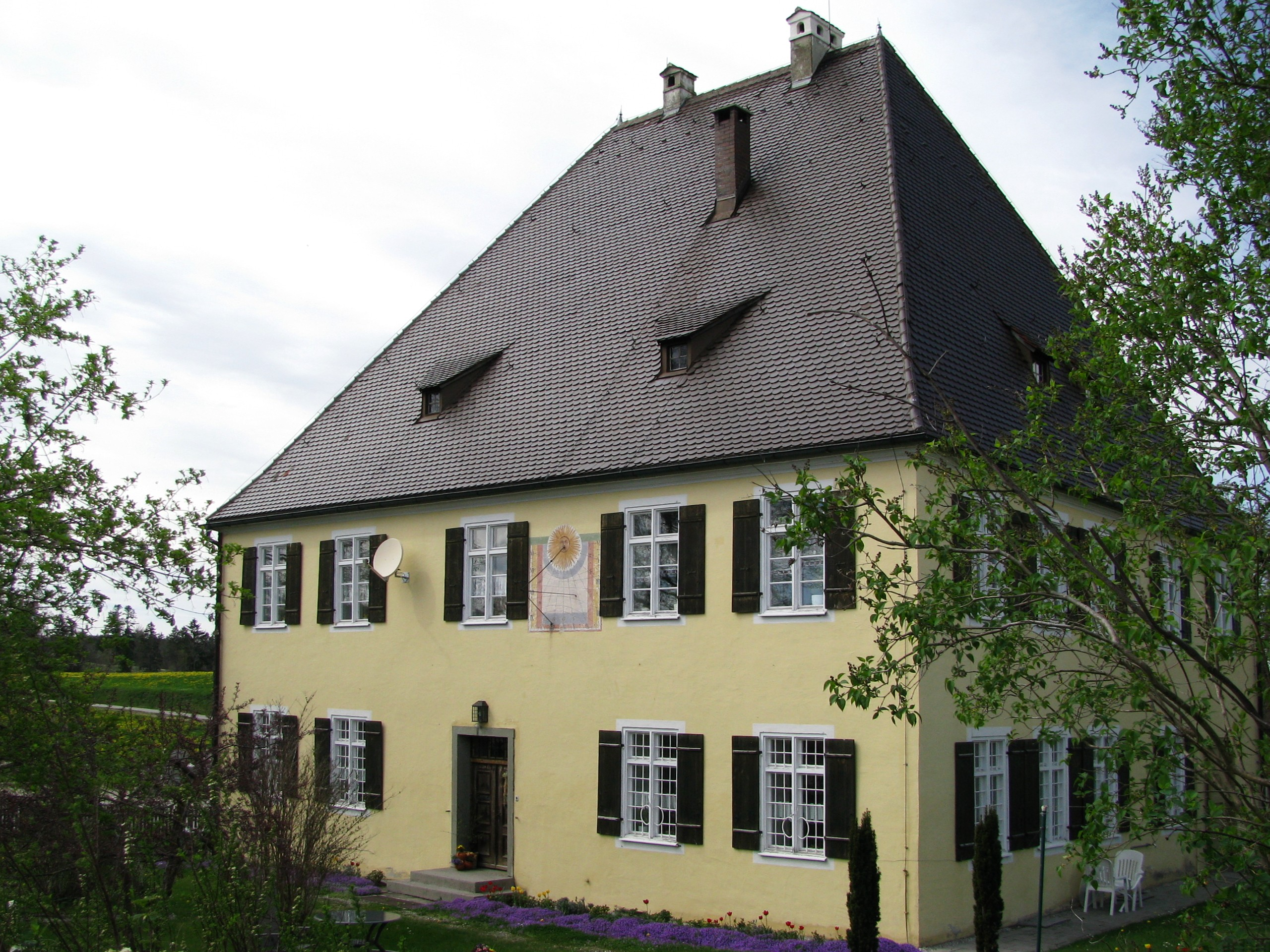 Rückholz, Ortsstraße 1; Pfarrhaus, ehem. Schlösschen als Sitz des Propstes, Walmdachhaus mit Schleppgauben, 1729/31 von Johann Georg Fischer erbaut.